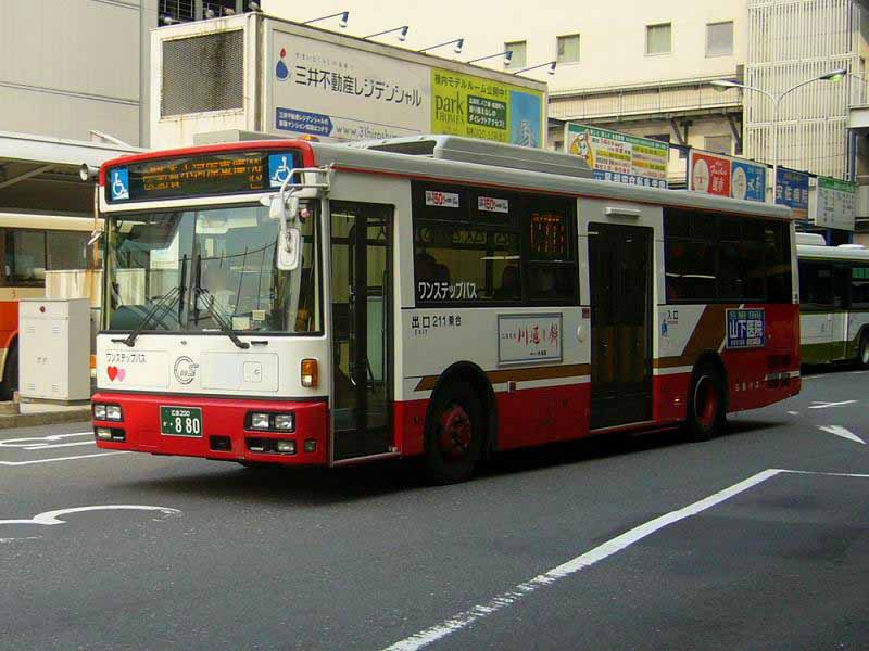 登録番号：広島200か・880 広島バス所属